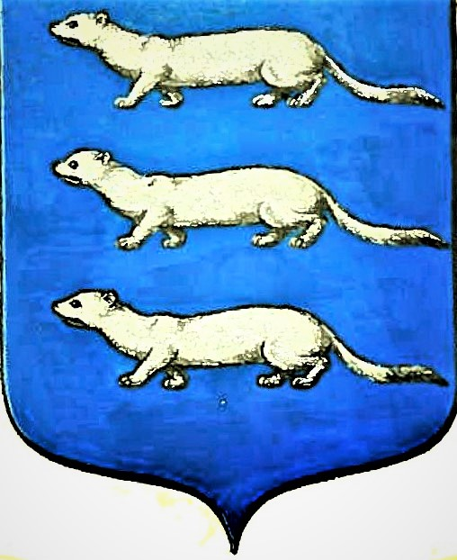 Stemma della famiglia Guillet rielaborato da quello pubblicato in Andrea Borella, "Annuario della Nobiltà Italiana.Nuova Serie", parte III, famiglie nobilitate dal re d'Italia Umberto II dopo il 1947. Era stato concesso da Umberto II di Savoia a Giuseppe Guillet, trasmissibile al fratello Amedeo, con il titolo di barone nel 1964. Descrizione: d'azzurro a tre ermellini d'argento, passanti e sovrapposti